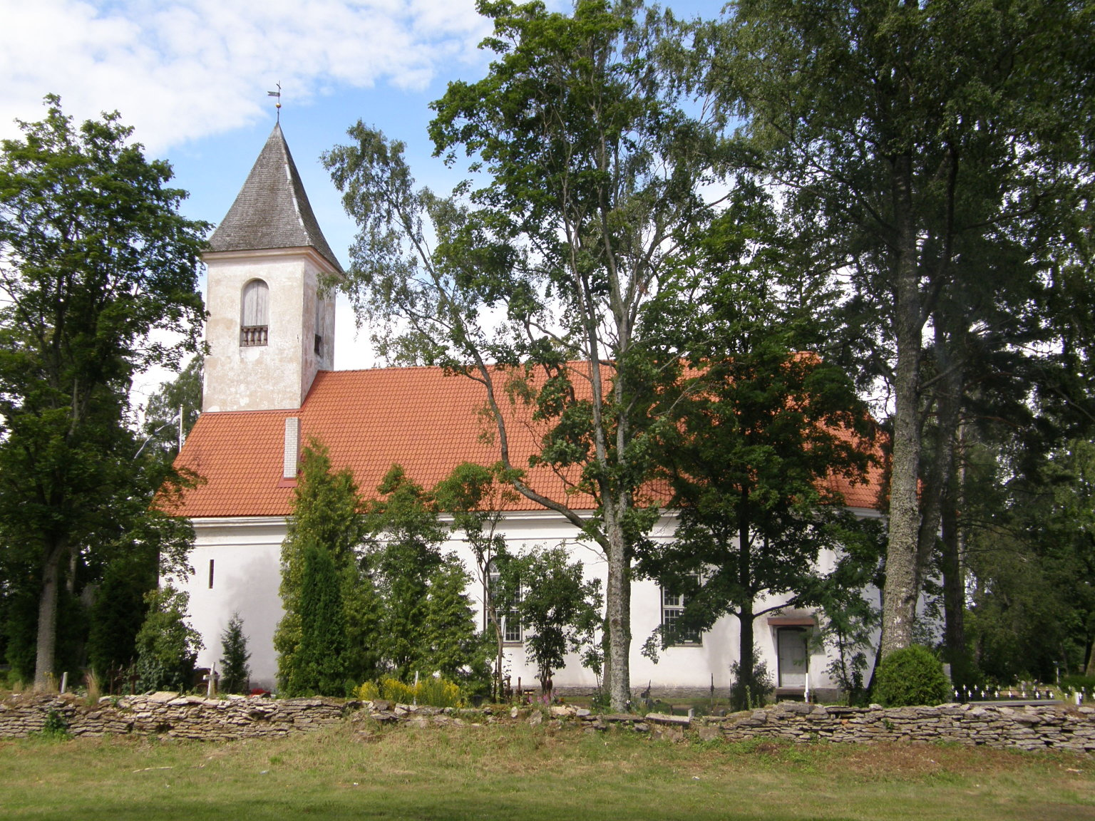 Loksa Maarja kiriku külgvaade